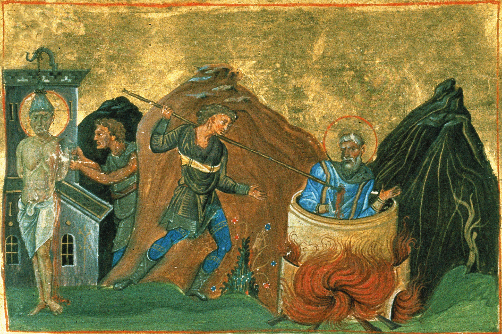 Св. Кириак Иерусалимский. Миниатюра из Минология Василия II. Мастер Симеон Влахернит (Fol. 144)